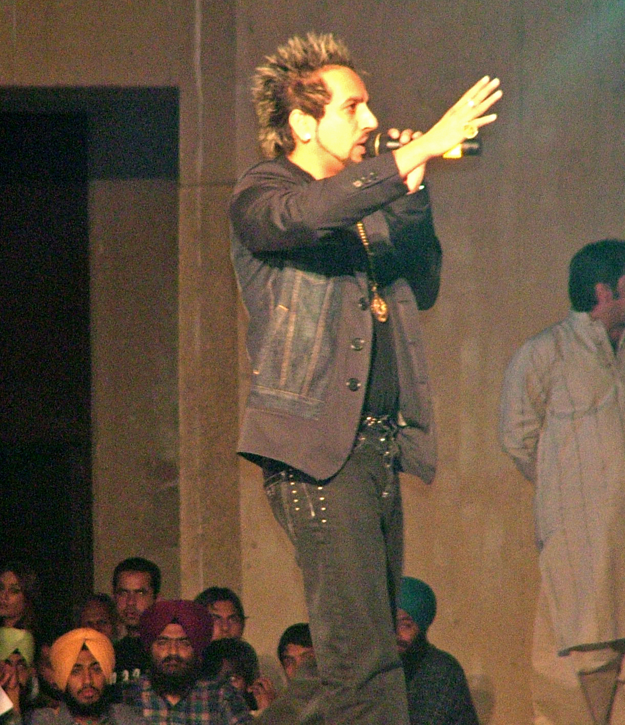 Jazzy B at Bhangra Night